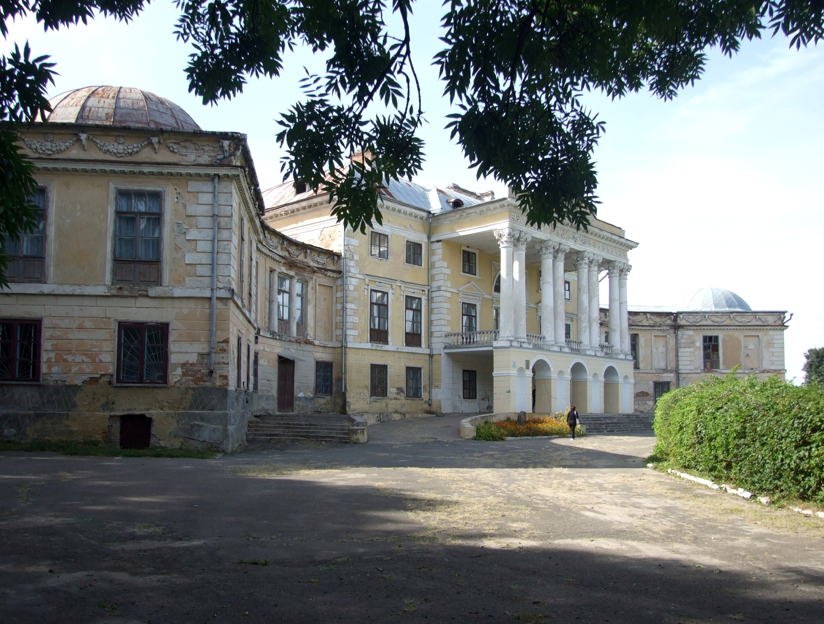 Палац Грохольських (пізніше - Можайських), 18 ст.